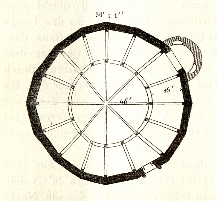 Holzschnitt aus den Mittheilungen der kaiserl. königl. Central-Commission zur Erforschung und Erhaltung der Baudenkmale Band 5, 1860. Beitrag von Wilhelm Lübke mit dem Titel: „Reisenotizen über die mittelalterlichen Kunstwerke in Italien“, 1858/1859, gemeinsam mit Karl Schnaase Druck: k. k. Hof- und Staatsdruckerei Zuordnung der Zeichnungen entsprechend dem Dateinamen